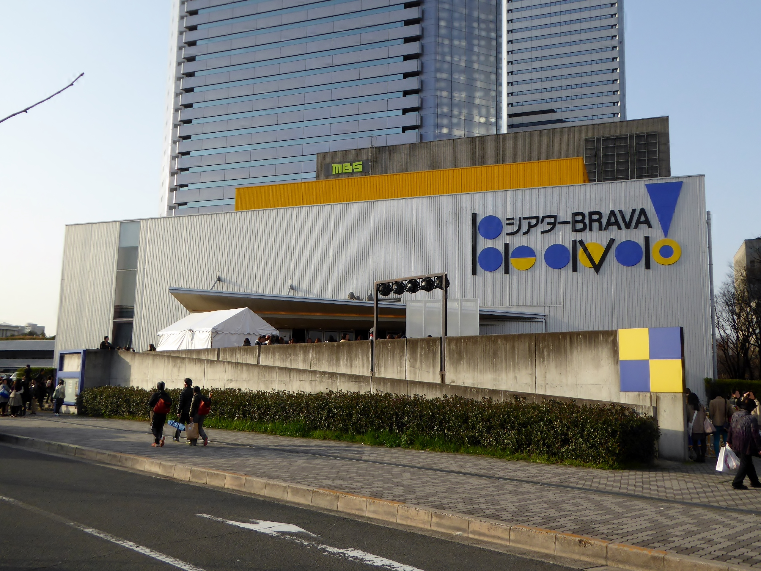 シアターBRAVA!を撮影。